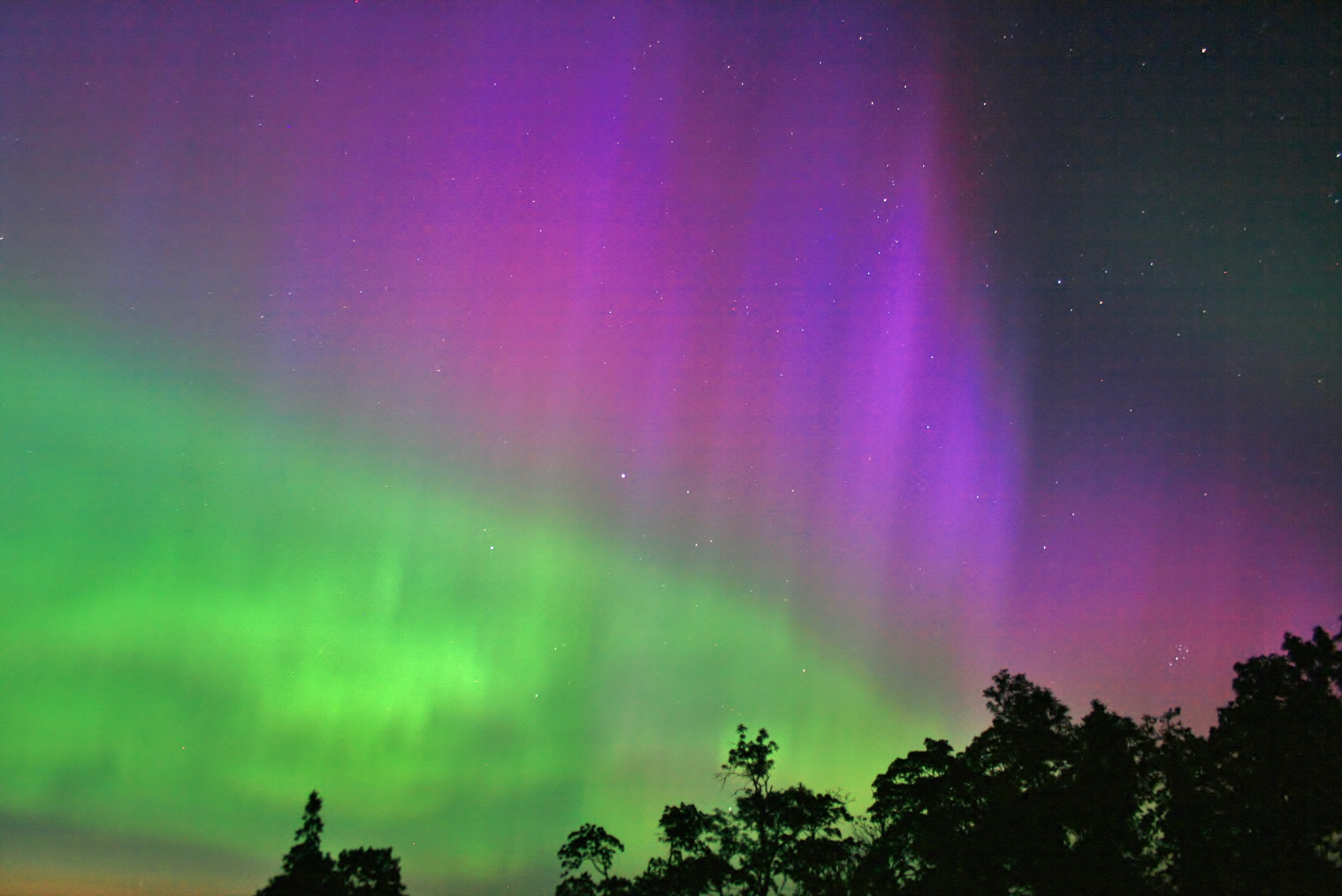 Siin on tegu virmalistega, mis ilmusid Eestitaevasse kuuendal augustil. Nähtuna Lääne-Virumaalt.